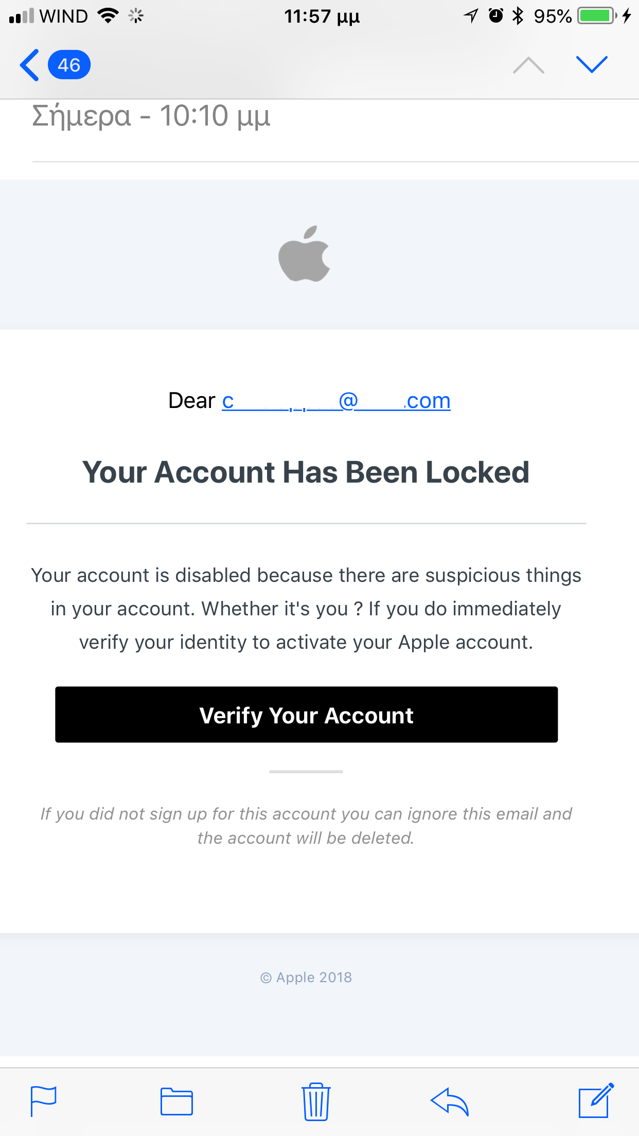 email με το οποίο κάποιος προσπαθεί να αποσπάσει προσωπικά δεδομένα